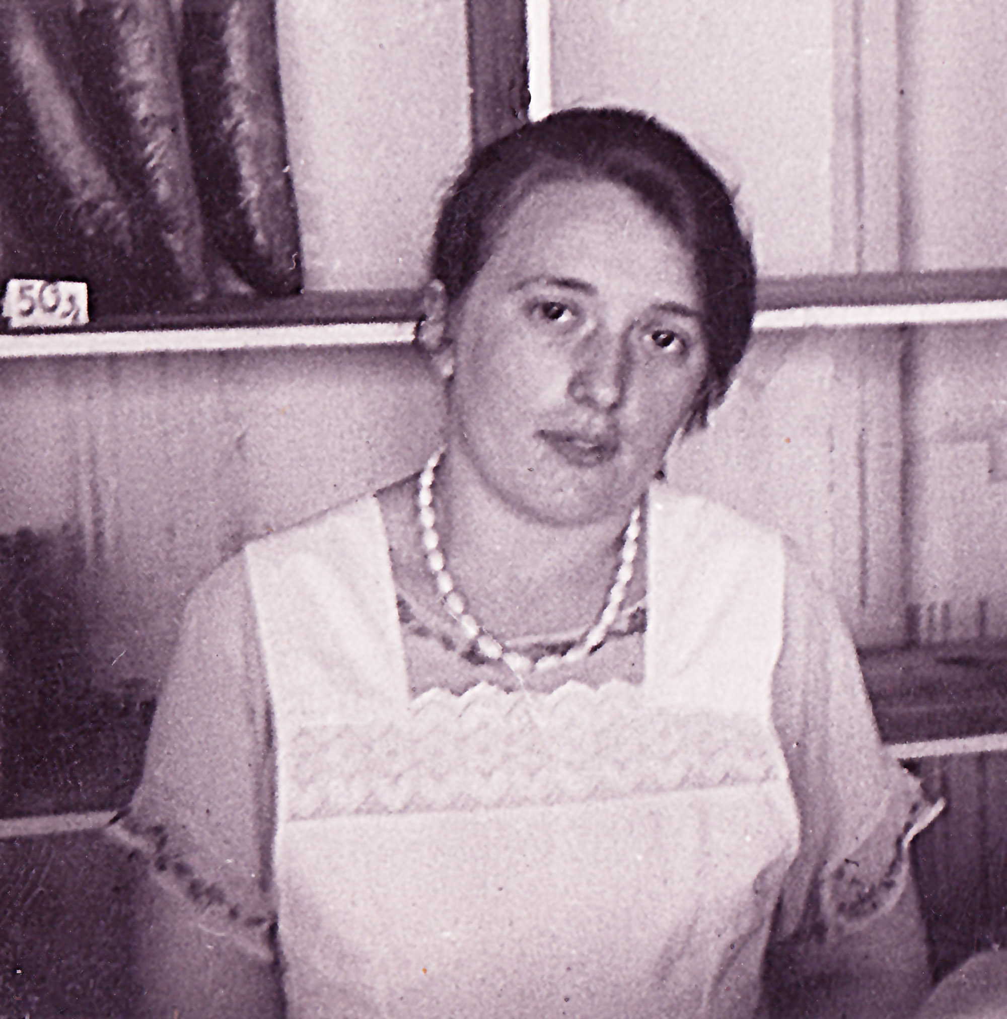 Martha Kronenberg etwa 27-jährig um 1938, als Brotverkäuferin in der Bäckerei Kronenberg in Schwelm, Potthofstraße.